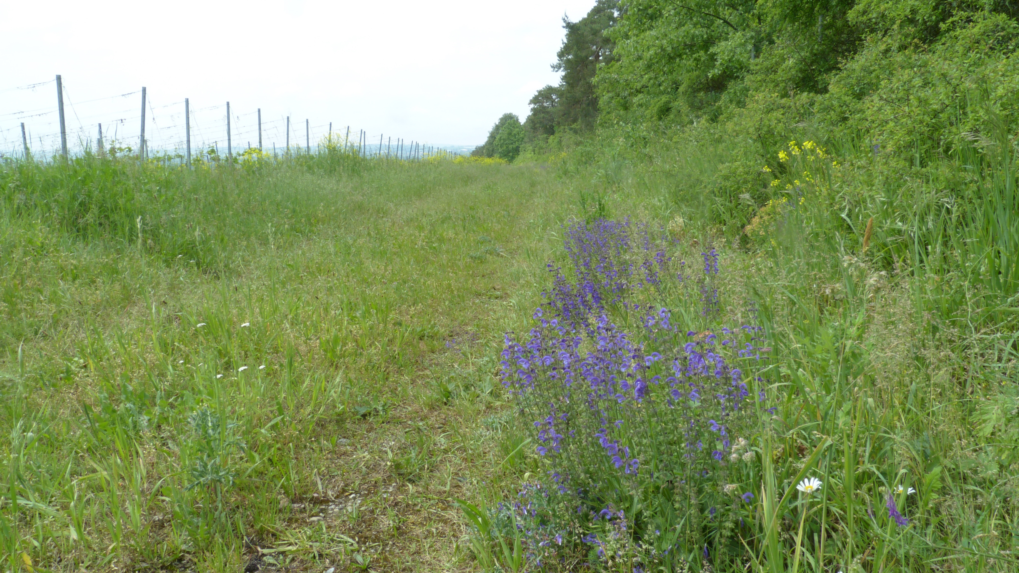 (NSG:BY-NSG-00587.01)_Kreuzberg bei Marktheidenfeld